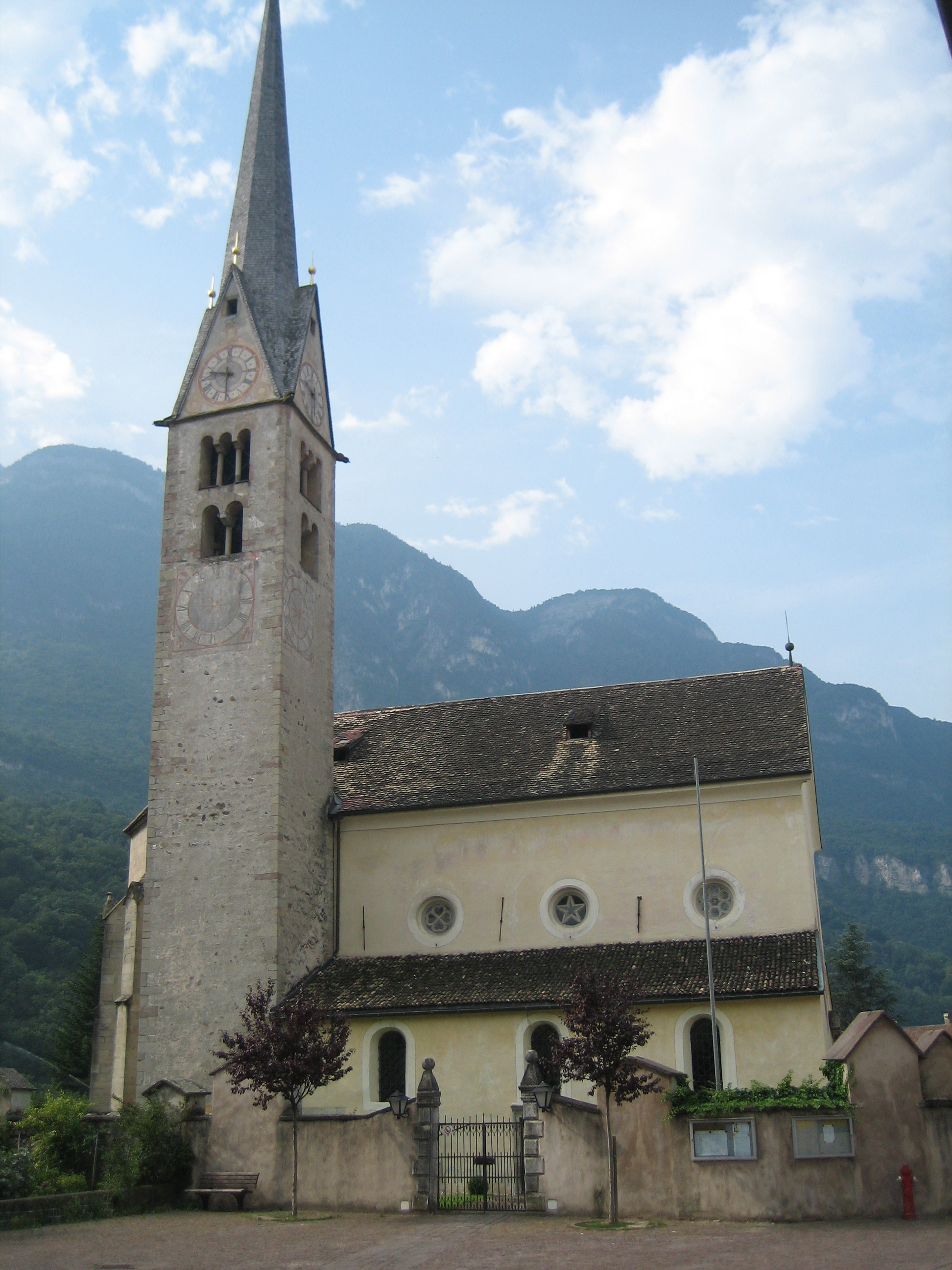 Nikolauskirche in Neumarkt